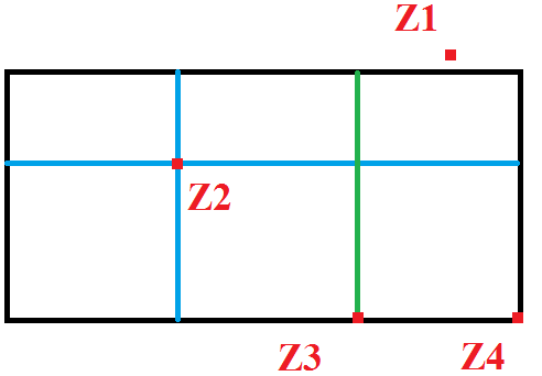 Rectangle pour démonstration du Lemme de Goursat, cas général où Z1, Z2, Z3, Z4 représentent des points où la fonction est continue mais pas holomorphe. On peut subdiviser le rectangle en d'autres rectangles pour se ramener au seul cas Z4.